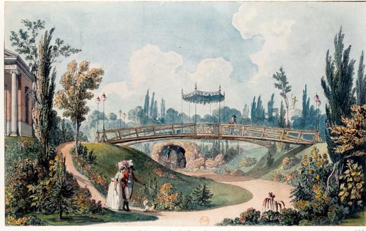 Jardins de l'hôtel Beaumarchais à Paris (quartier de la Bastille) Aquarelle, plume et encre de Chine ; 20,5 x 32,8 cm Paris, Bibliothèque nationale de France, fonds Destailleur Référence bibliographique : Destailleur Paris, t. 1, 152